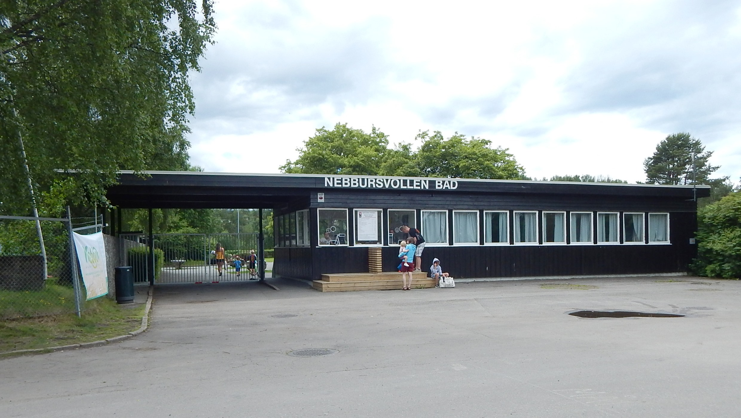 Inngangspartiet ved Nebbursvollen bad